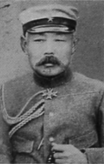 Japanese general Ijichi Kosuke (1854-1917)